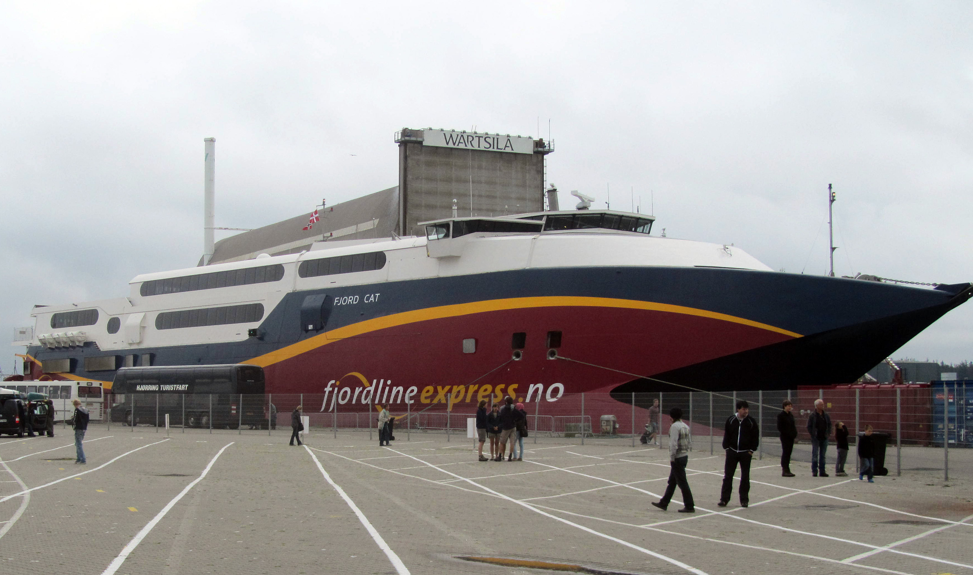 Fjord Cat fra rederiet Fjord Line i Hirtshals